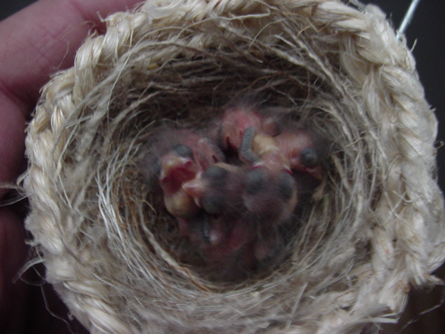 Polluelos de tres dias de edad. Description: Three days black headed red siskin chicks (Carduelis cucullata) Creator: Luis Carocci. Date: 30 de noviembre de 2007 (30-11-2007) Place: Canada